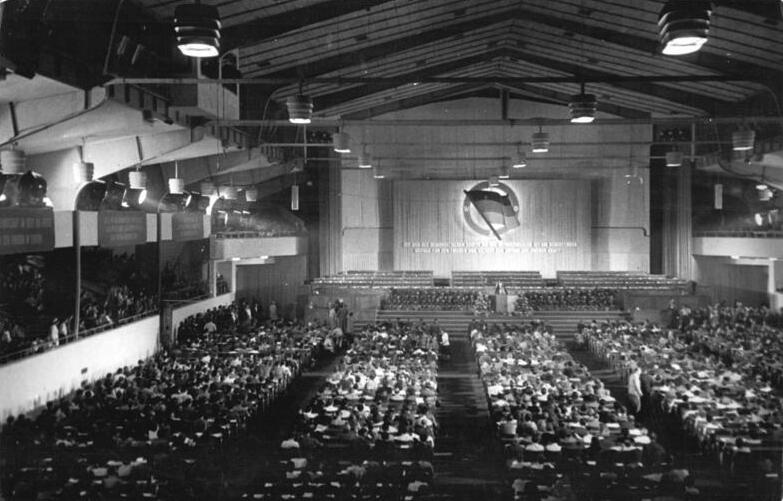 Berlin, Werner-Seelenbinder-Halle Gesamtdeutscher Nationalkongress der Nationalen Front in Berlin. Am 25. und 26. August 1950 fand in der Werner Seelenbinder-Halle in Berlin der Nationalkongress der Nationalen Front des demokratischen Deutschland statt. Im Mittelpunkt des Kongresses stadt die Behandlung der Frage der nationalen Souveränität, des nationalen Aufstieges und der Organisierung des nationalen Widerstandes gegen die anglo-amerikanischen Interventionstruppen. UBz: Übersicht während der Tagung. Aufn.: Illus 7695-50 2 26.8.50 Be.